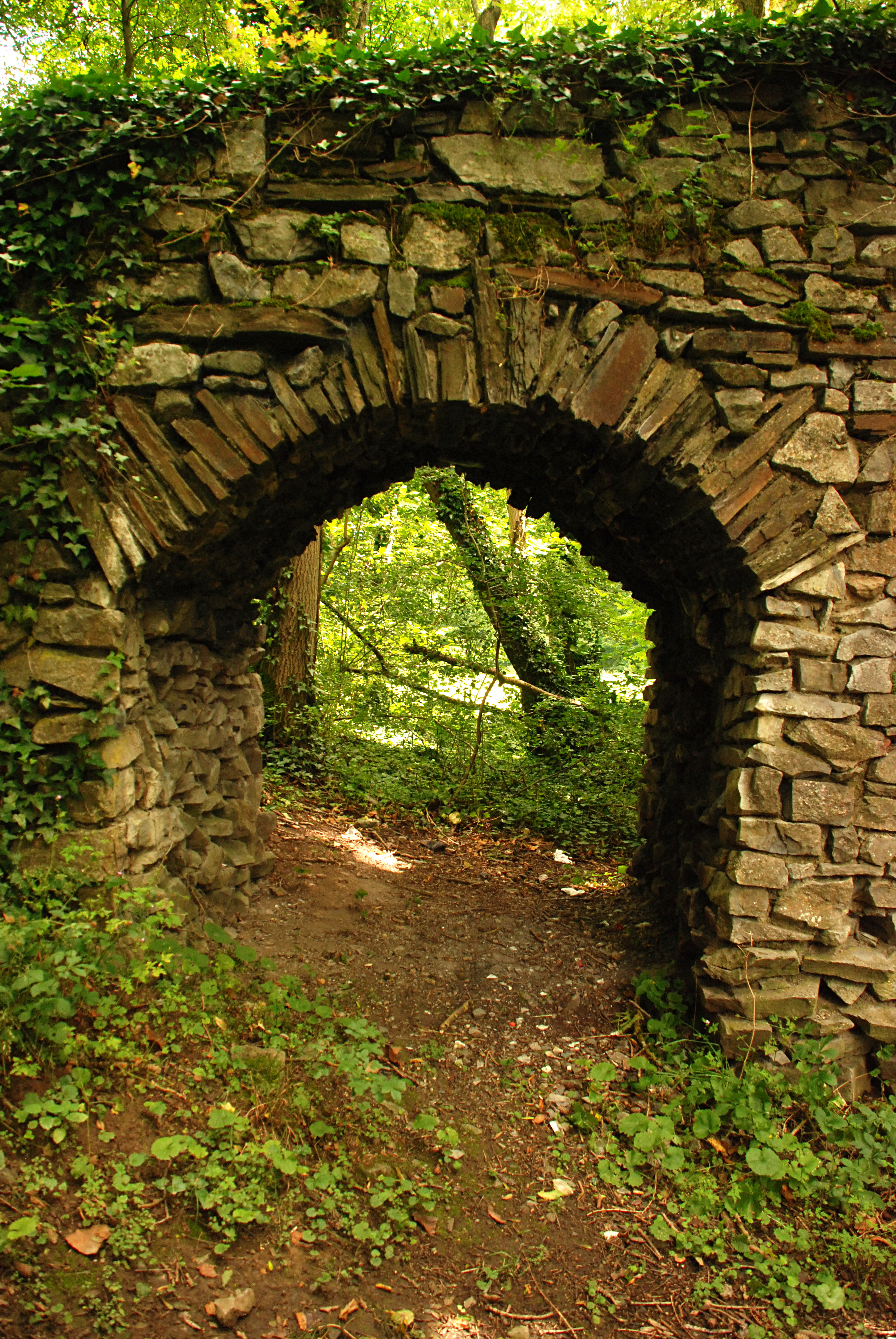 Aqueduc romain de Mettet